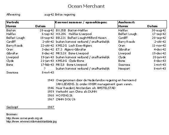 'Carriere' van de Ocean Merchant van te water lating tot sloop